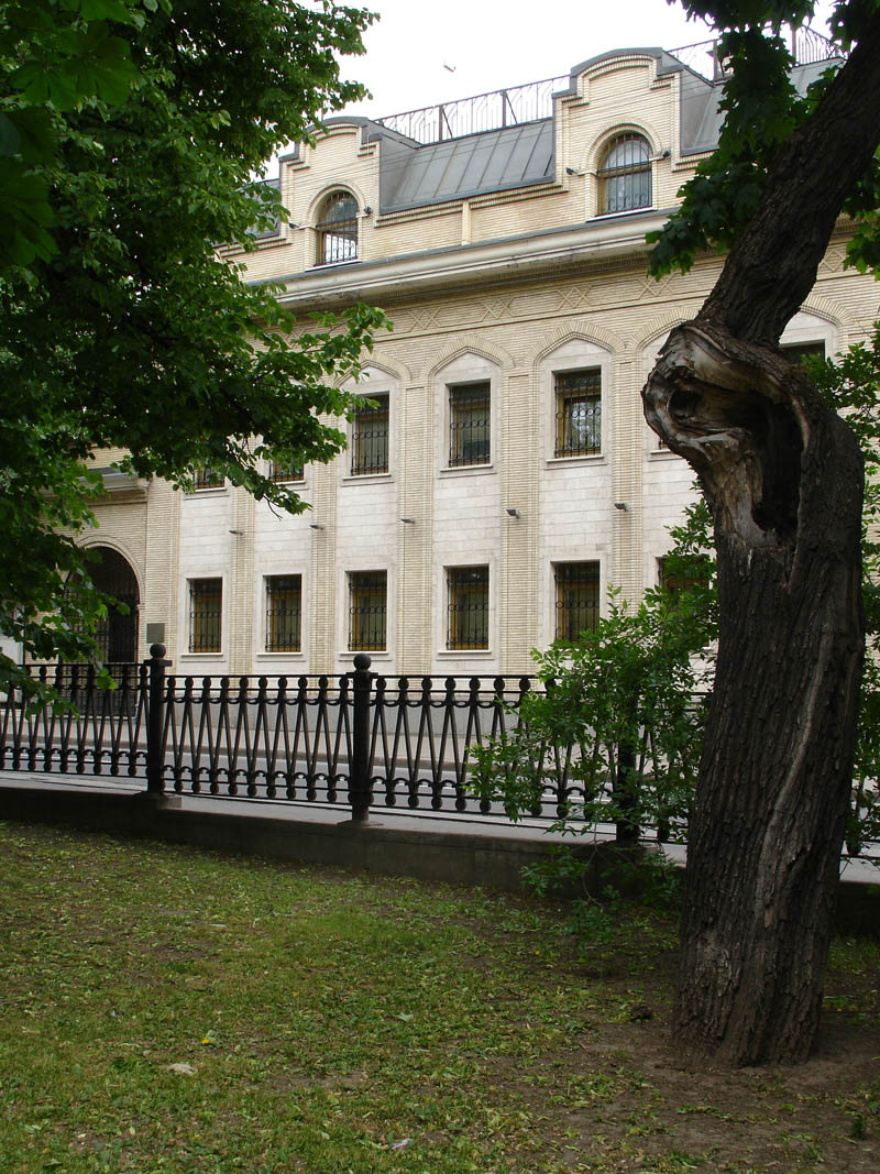 Moscow, Pokrovsky Boulevard 7 RUSSIAN: Москва. Покровский бульвар, 7